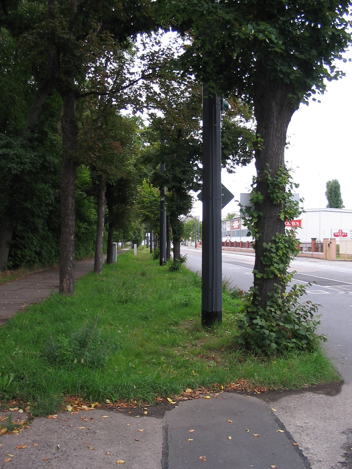 Radebeul, Meißner Straße, Reste des Chausseegrabens